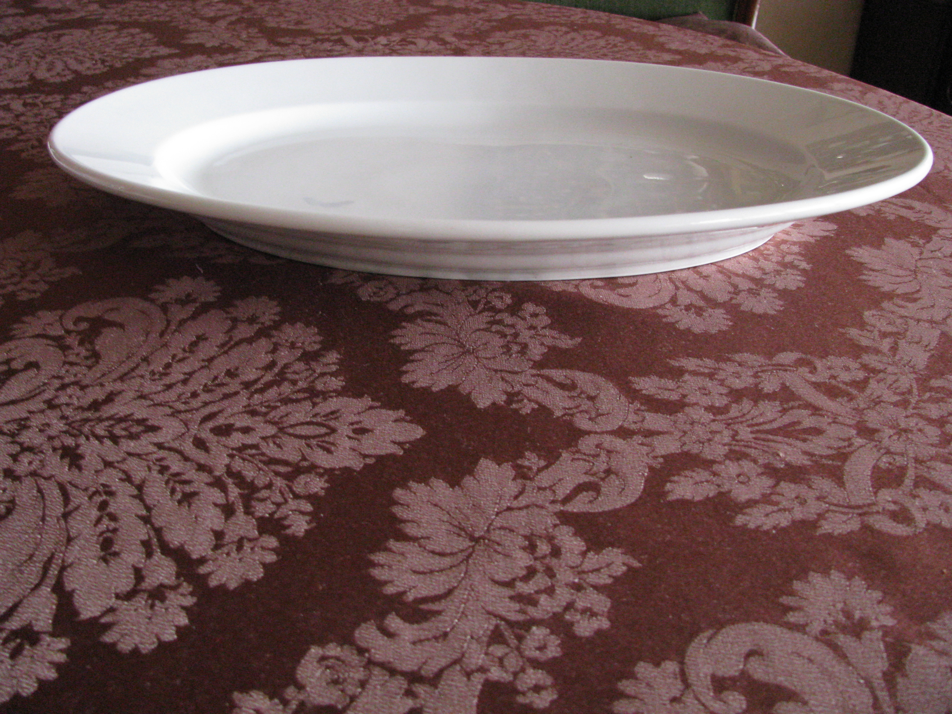 Fleischplatte oder Servierplatte, weiß, schlicht, Größe: 41,5 cm x 27,5 cm - Manufaktur: Krister Porzellan-Manufaktur, Stempel mit Jahreszahl 1941, Adler und Hakenkreuz, Buchstaben: Fl. U. V. (laut "Internet" eventuell "Flieger-Unterkunfts-Verwaltung")